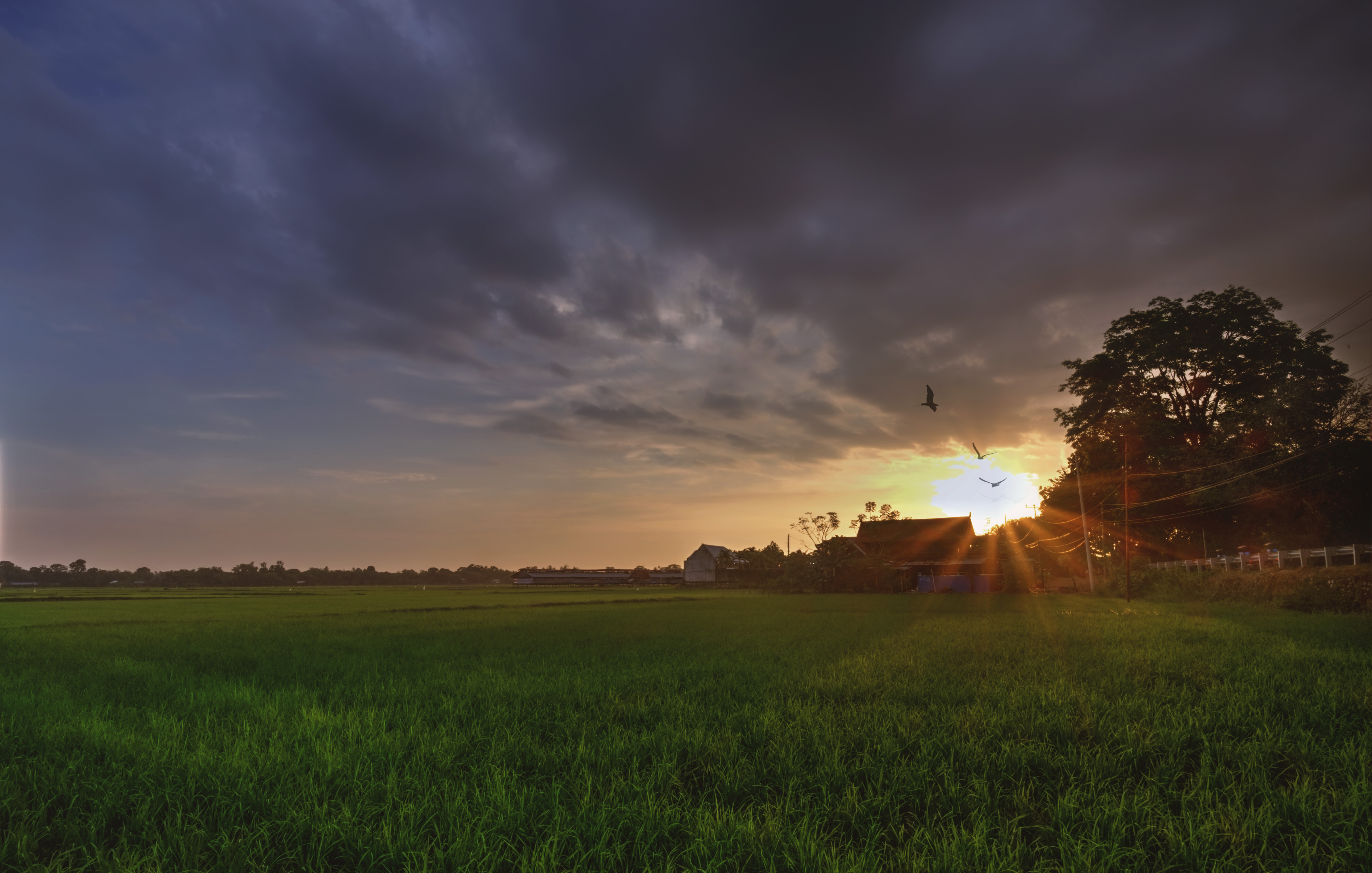 Saat matahari terbenam adalah saat yang paling ditunggu oleh fotografer manapun. Momen itu tidak dinyana berulang lagi saat saya merasa kurang beruntung mencari objek foto di Bantimurung. Tuhan memang sangat baik!